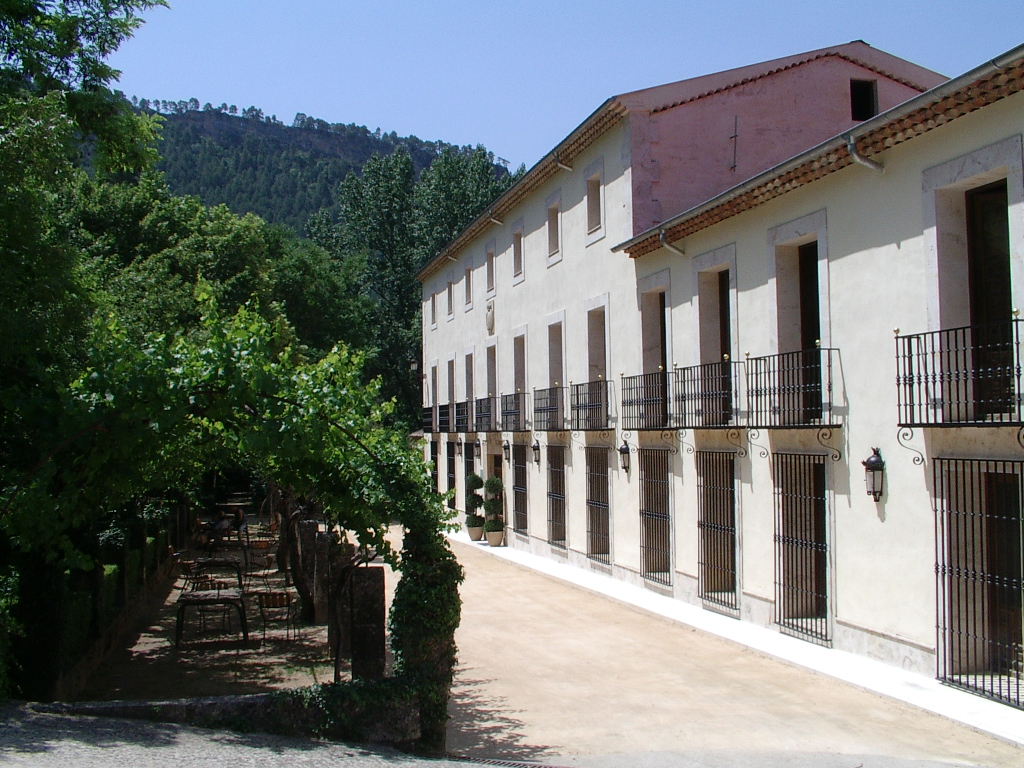 Balneario antiguo